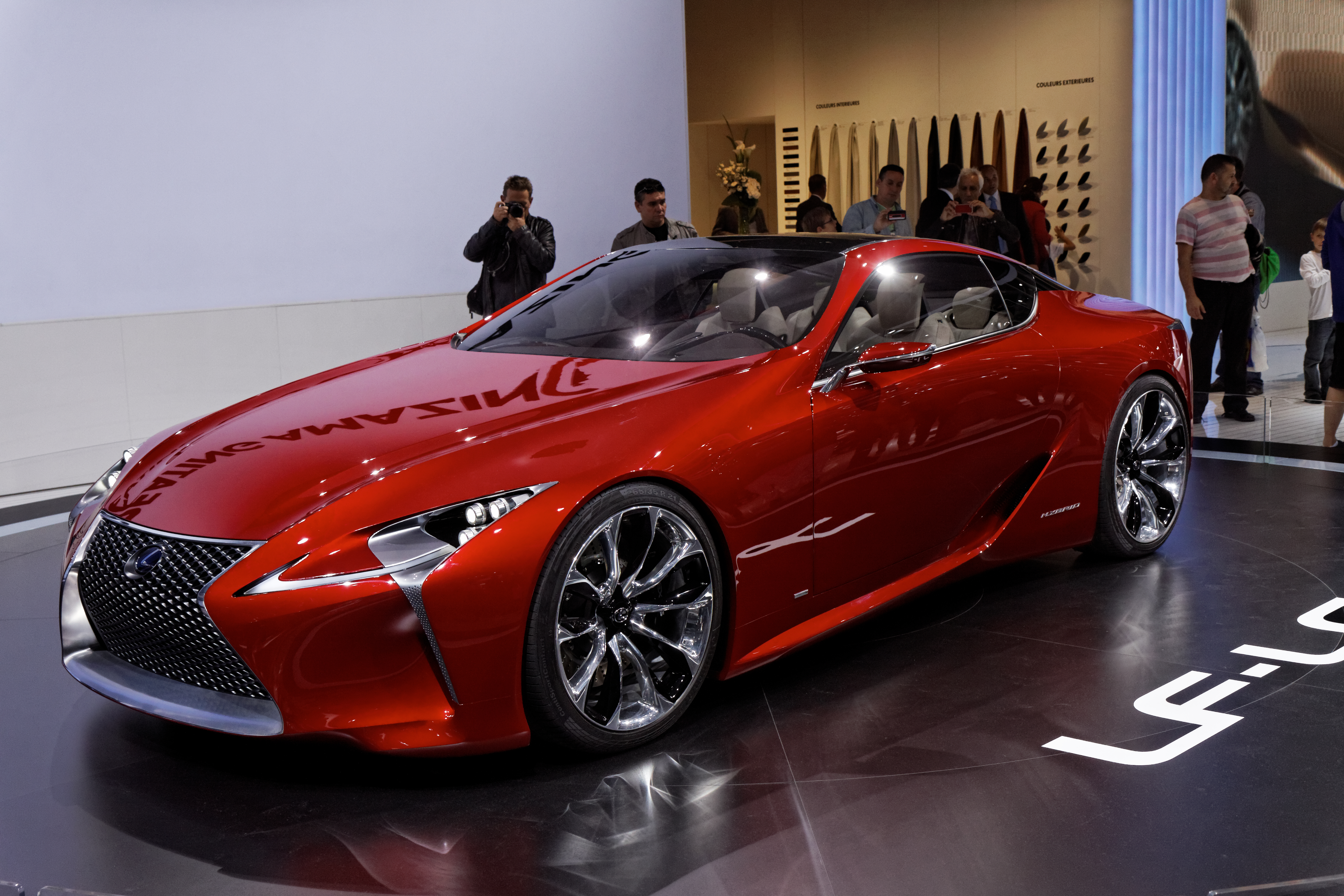 Une Lexus LF-LC présentée lors du Mondial de l'automobile de Paris 2012.